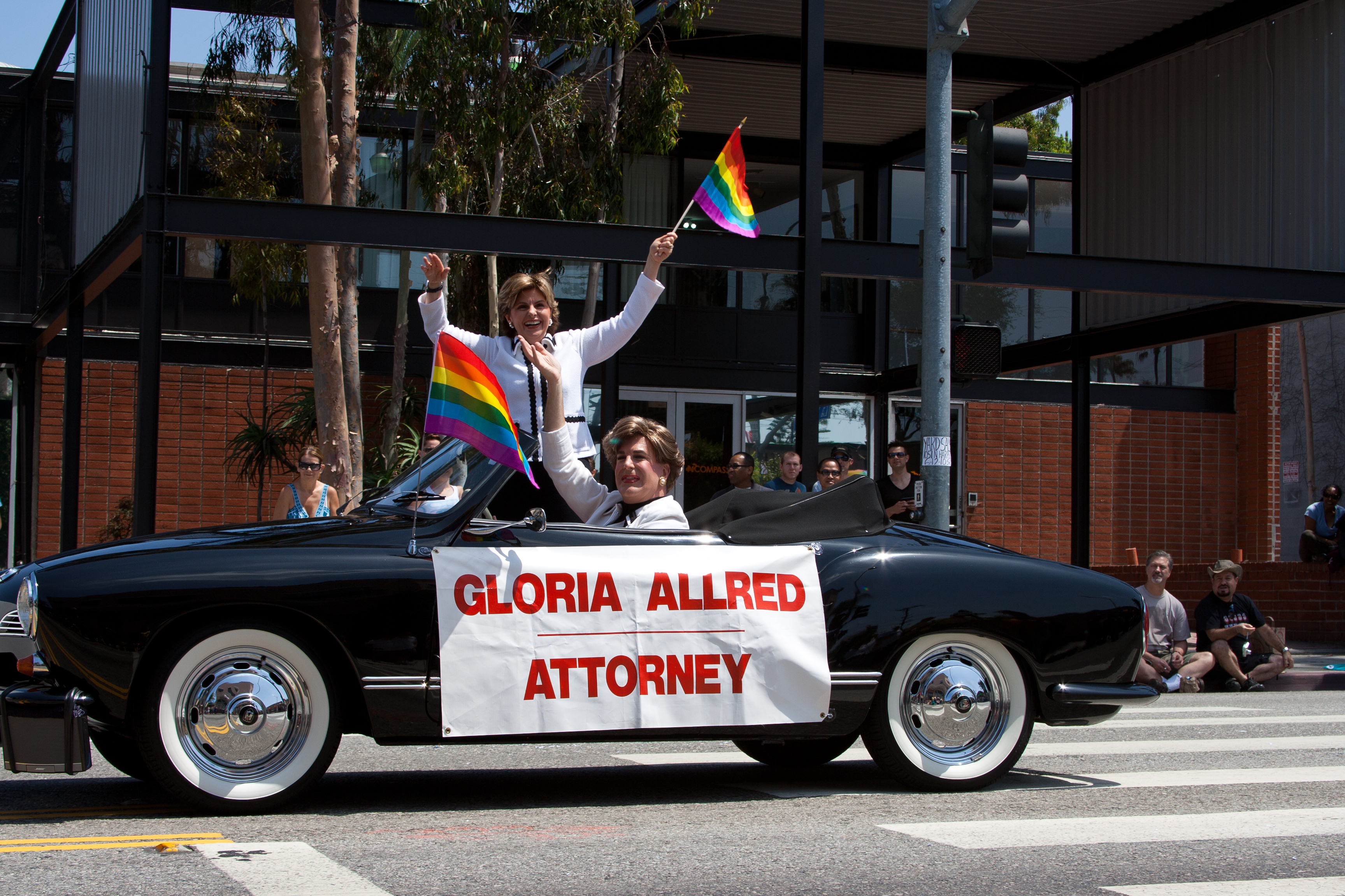 PRIDE 2010 Parade